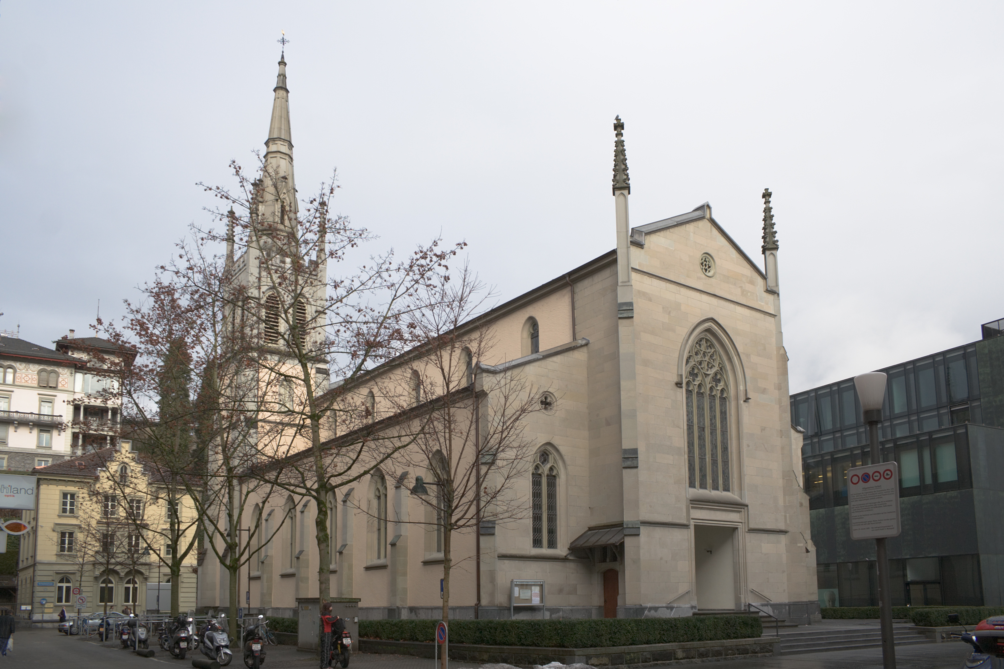 Matthäuskirche von Ferdinand Stadler in Luzern, Schweiz